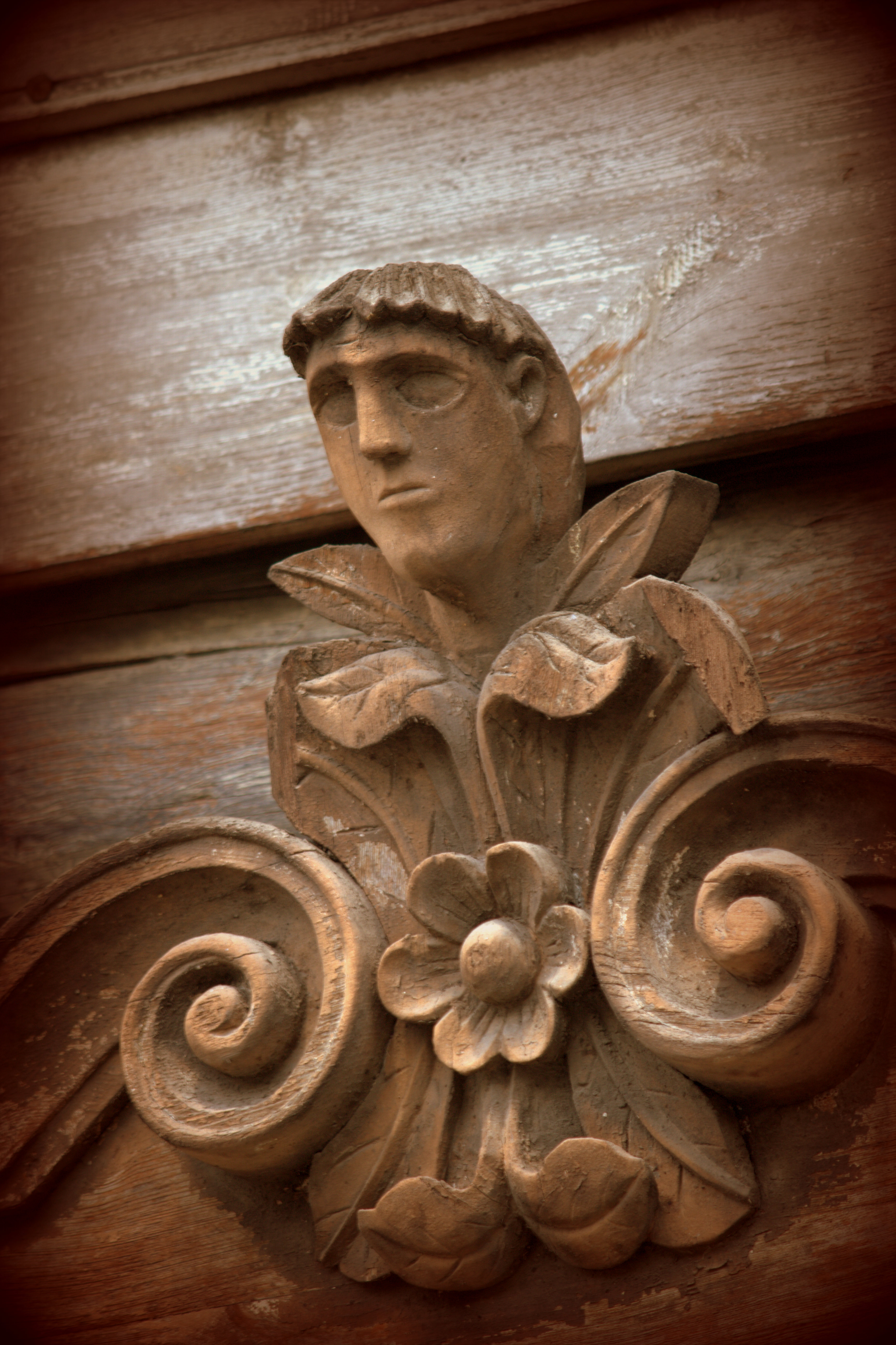 Декор окна купеческого деревянного дома. Улан-Удэ, ул. Линховоина